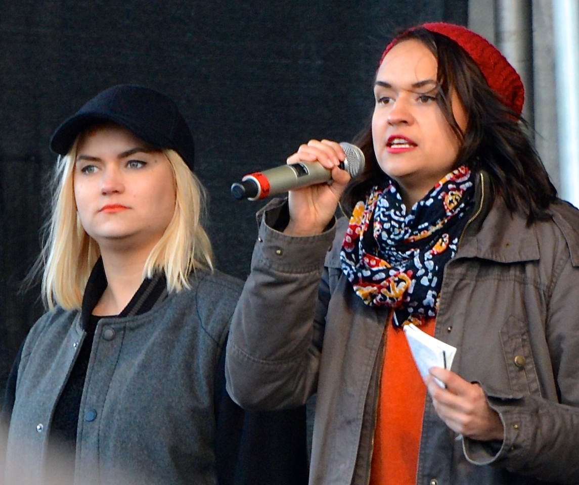 Tiffany Kronlöf (till vänster) och Bianca Kronlöf (höger) på antirasistdemonstrationen i Kärrtorp den 22 december 2013.